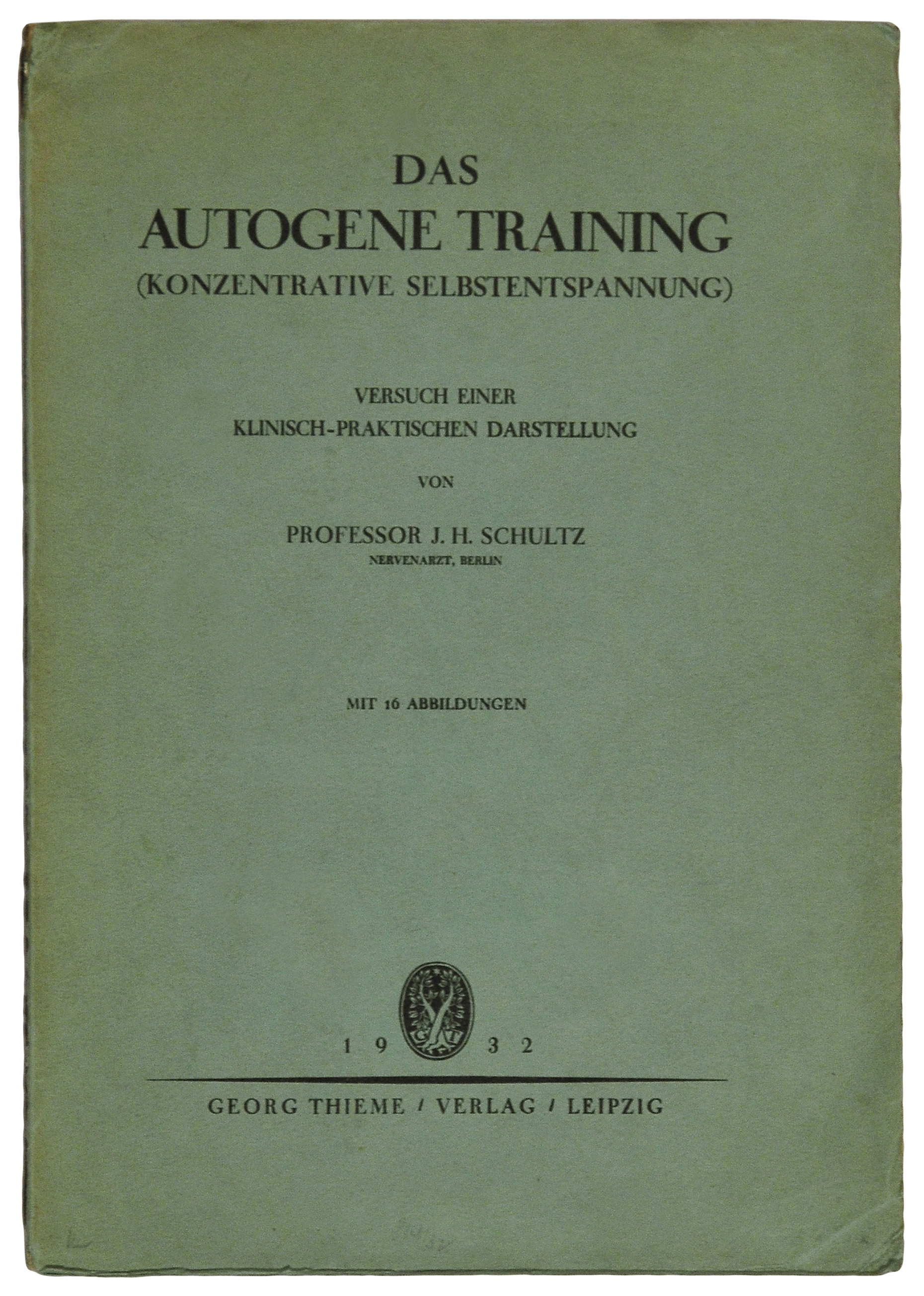 Schultz, Johannes Heinrich: Das Autogene Training (Konzentrative Selbstentspannung). Versuch einer klinisch-praktischen Darstellung. Johannes Heinrich Schultz (1884 – 1970) gilt als bedeutender Vertreter der nicht-analytischen Psychotherapie. Er führte die Begriffe Fremd-, Rand-, Schicht- und Kernneurose ein. Mit seiner autosuggestiven Entspannung, dem „Autogenen Training“, erreichte er bleibende Wirkung. Leipzig: G. Thieme 1932, 305 Seiten + 1 Blatt Verlags-Anzeigen